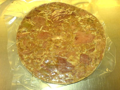 Sazdarma